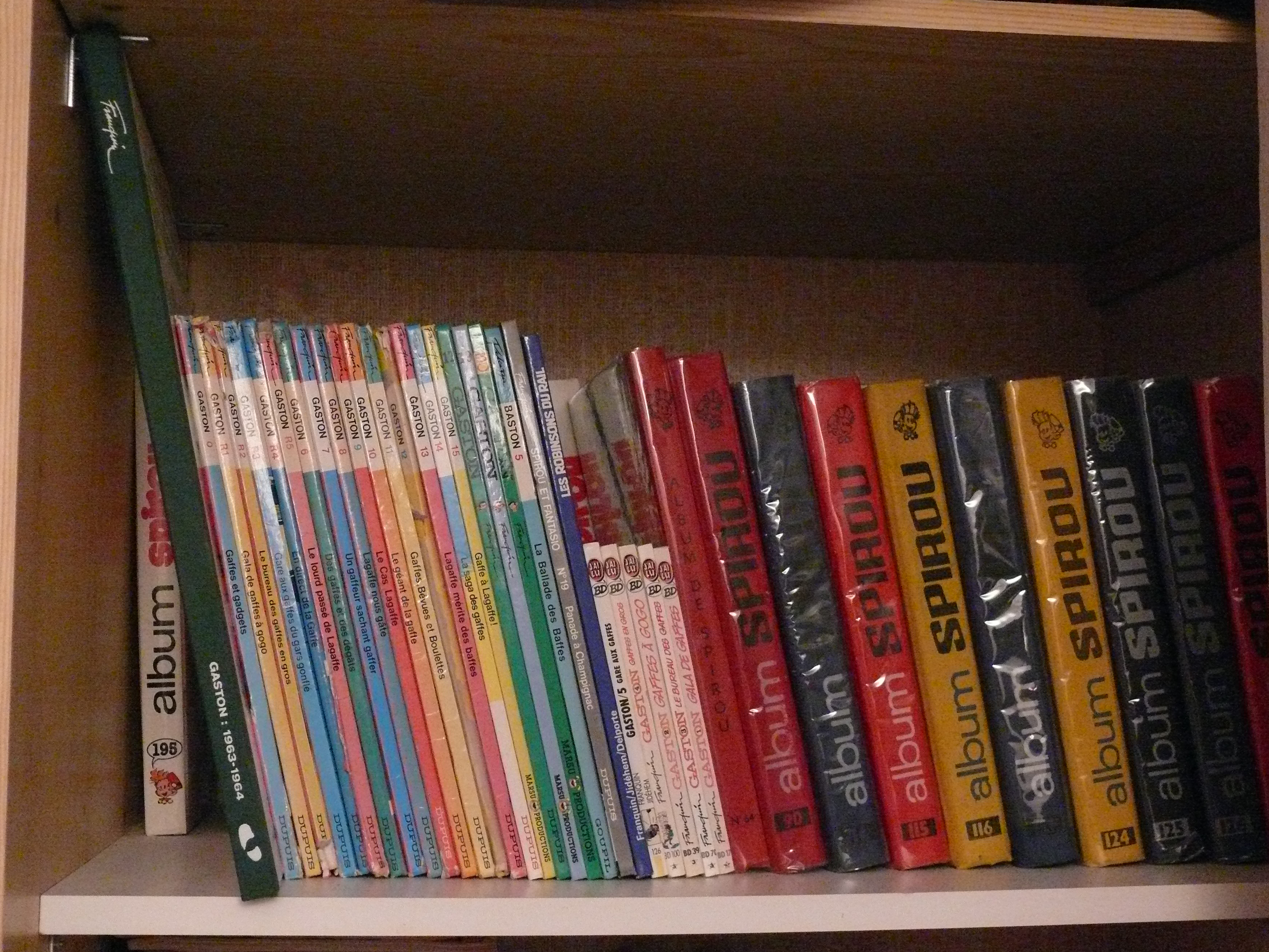 Bibliothèque comprenant des recueils du journal de Spirou et des albums de Gaston.